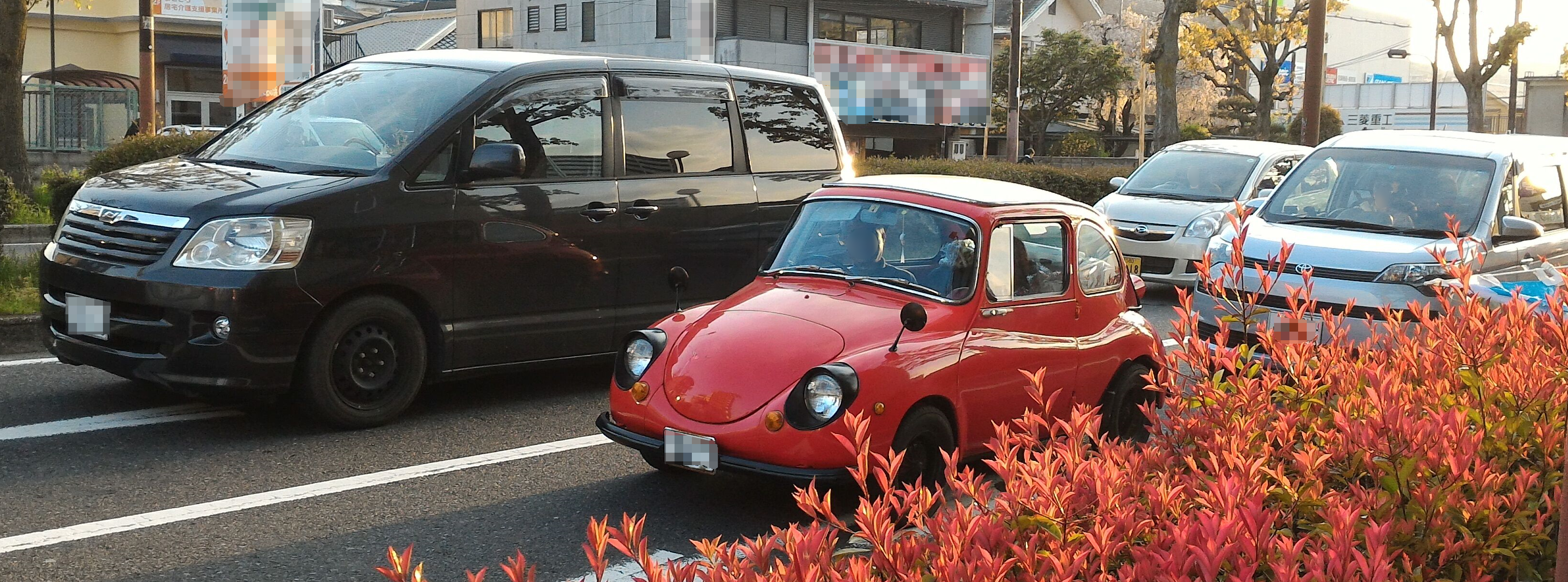 2017年に交通量の多い幹線道路で2010年代の自動車に伍して走行するスバル360 滋賀県大津市内 県道18号線